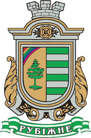 Герб города Рубежное Луганской области